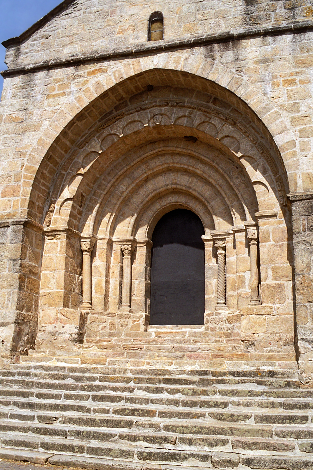 Dore-l'Eglise (Velay) : portail polylobé